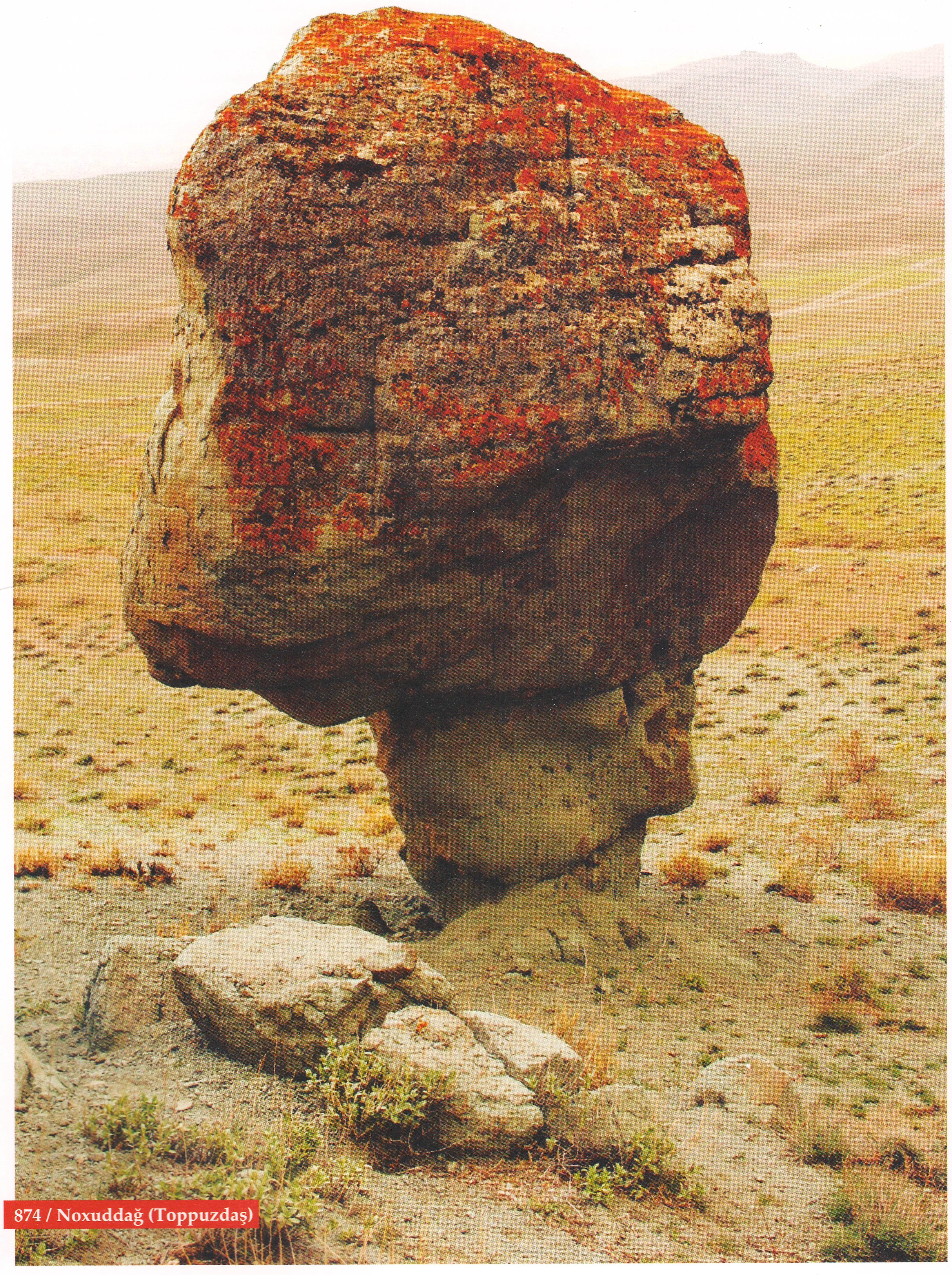 Babək rayonu Noxuddağ (Toppuzdaş)